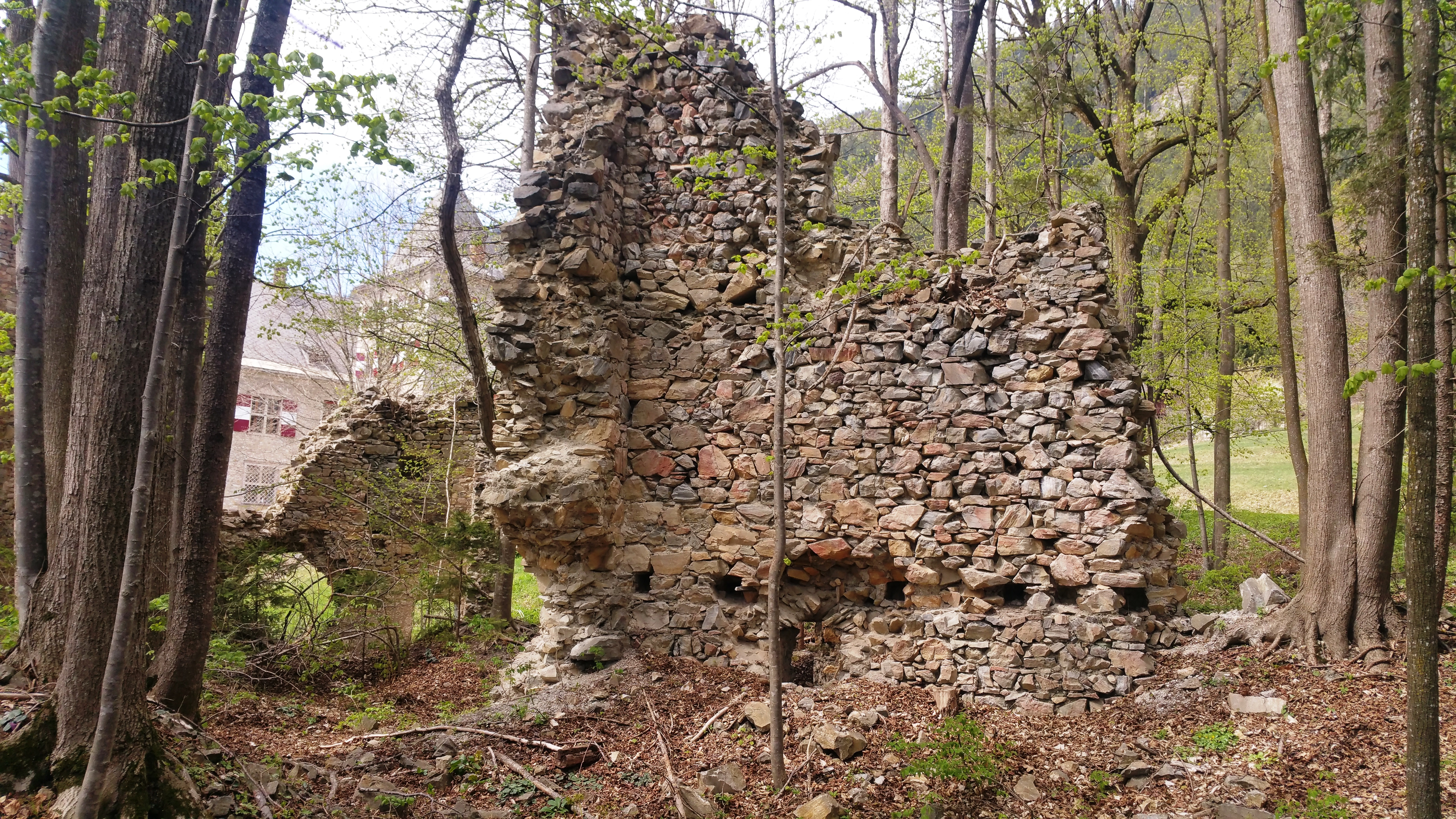 Altburg Pux/Schlossruine. Links hinten Schloss Pux.